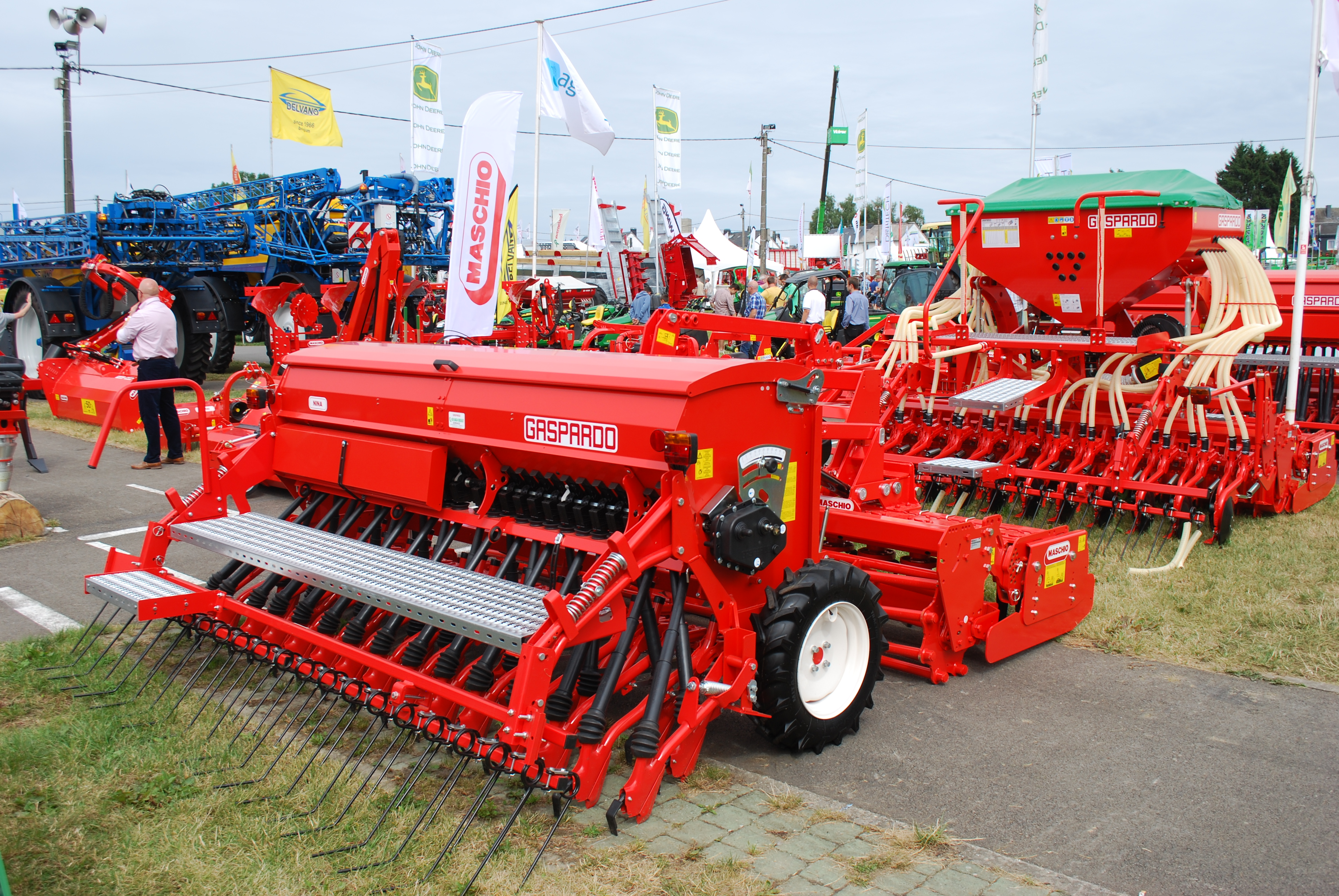 Vue de la 81e foire agricole de Libramont, en 2015.